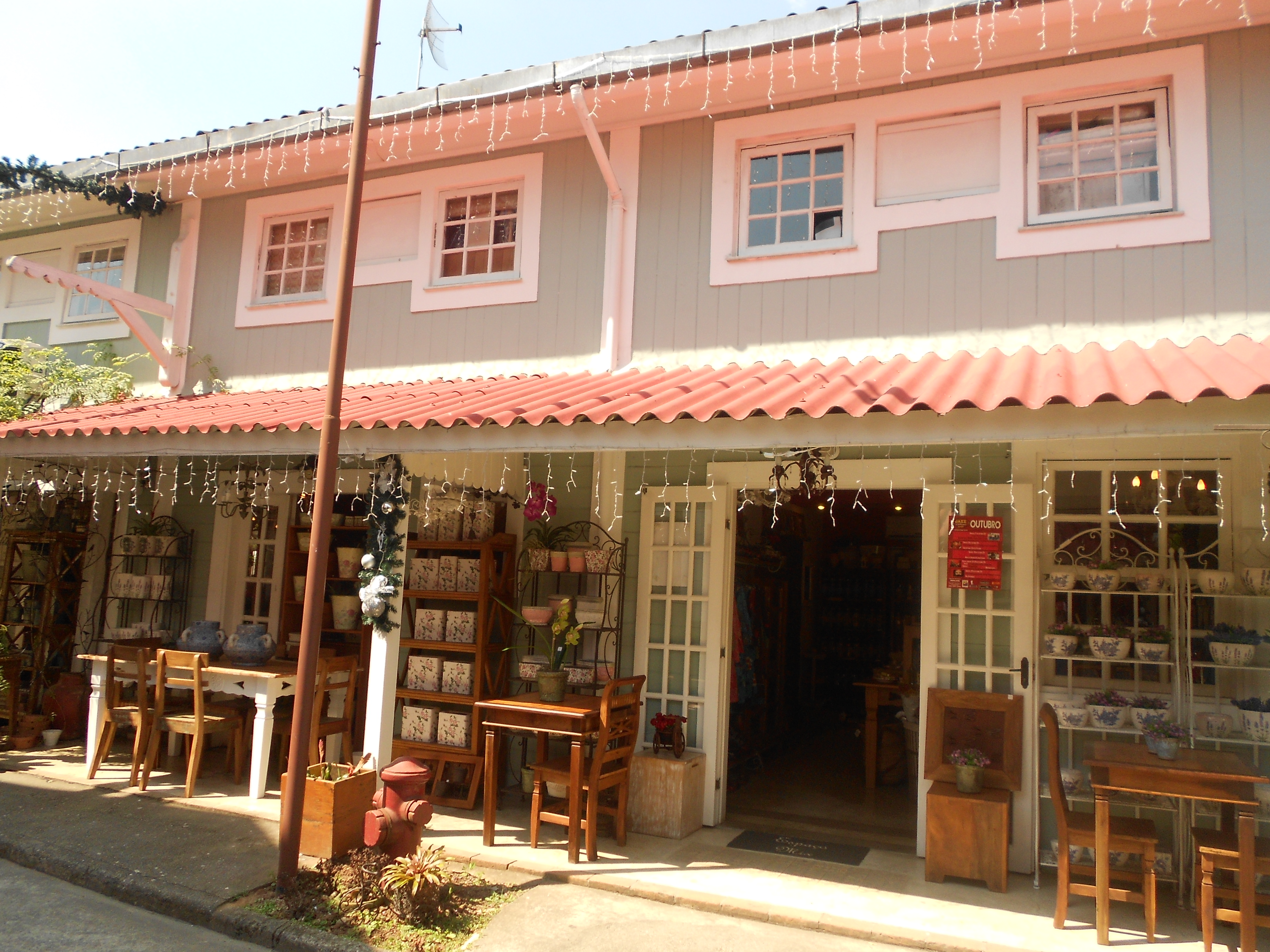 Pequena Finlândia, em Penedo, Itatiaia, estado do Rio de Janeiro, Brasil.